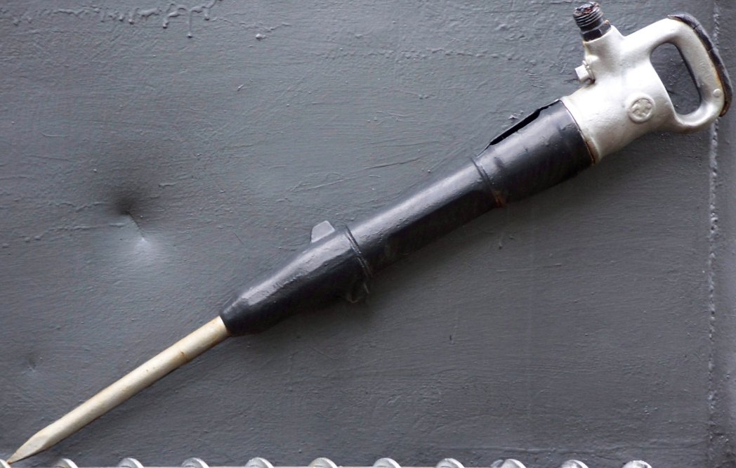 Pneumatischer Abbauhammer für den Steinkohlebergbau